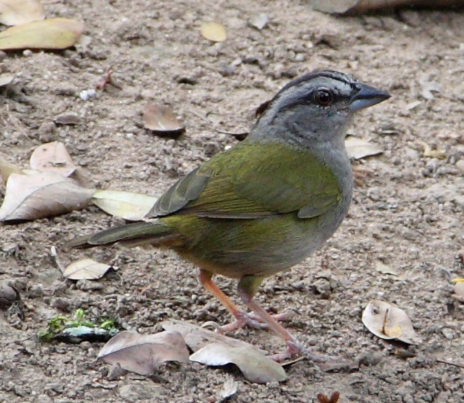 Arremonops chloronotus en Belice.